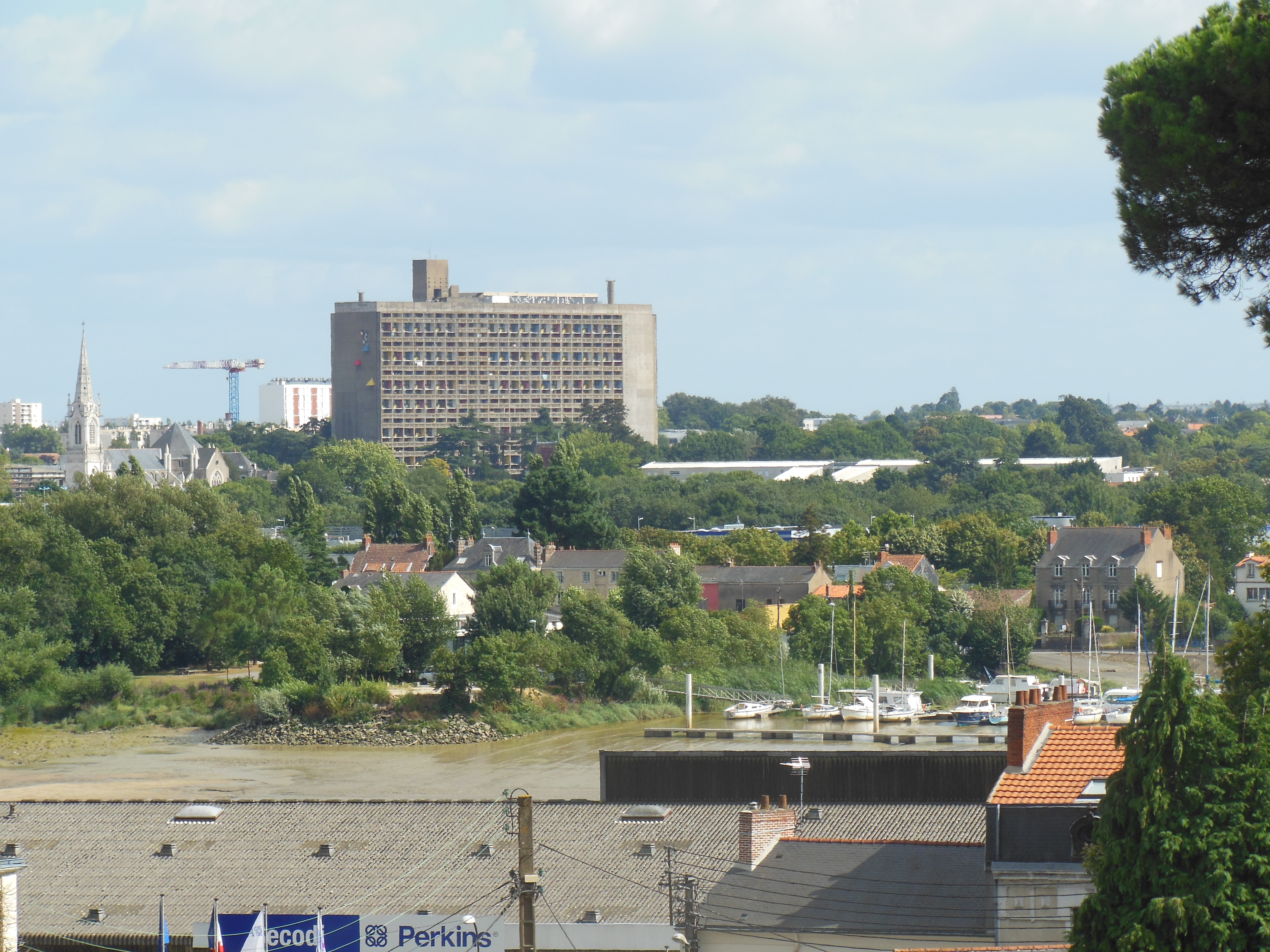 Vue sur Rezé (Cité Radieuse, église Saint-Pierre) et Trentemoult depuis le Parc des Oblates (Nantes, France)